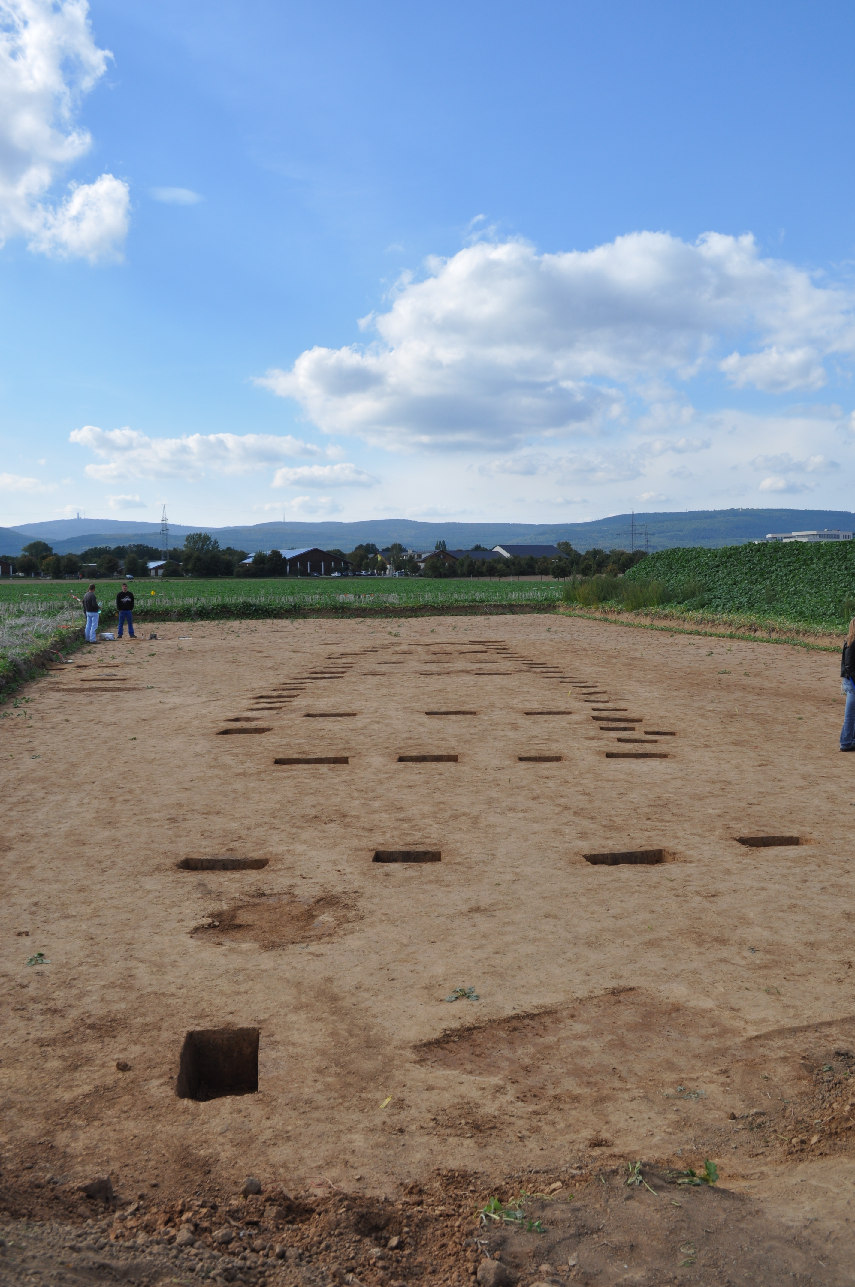 Ausgrabungen auf dem Gelände des Neubaus der Hochtaunuskliniken in Bad Homburg. Das Bild zeigt die Fundamente eines Gebäude der Rössener-Kultur auf dem Gelände